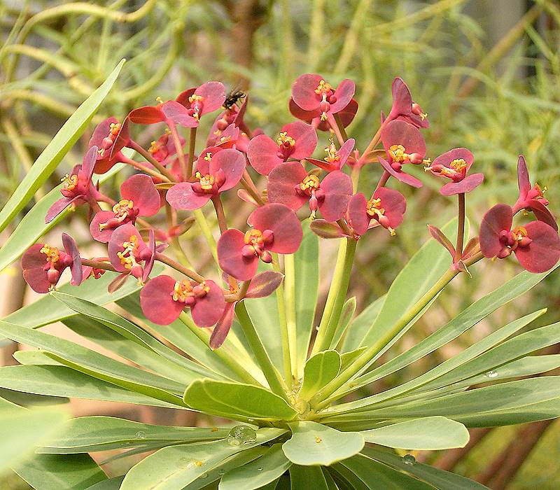 Euphorbia atropurpurea var. atropurpurea, BG Bochum, Germany